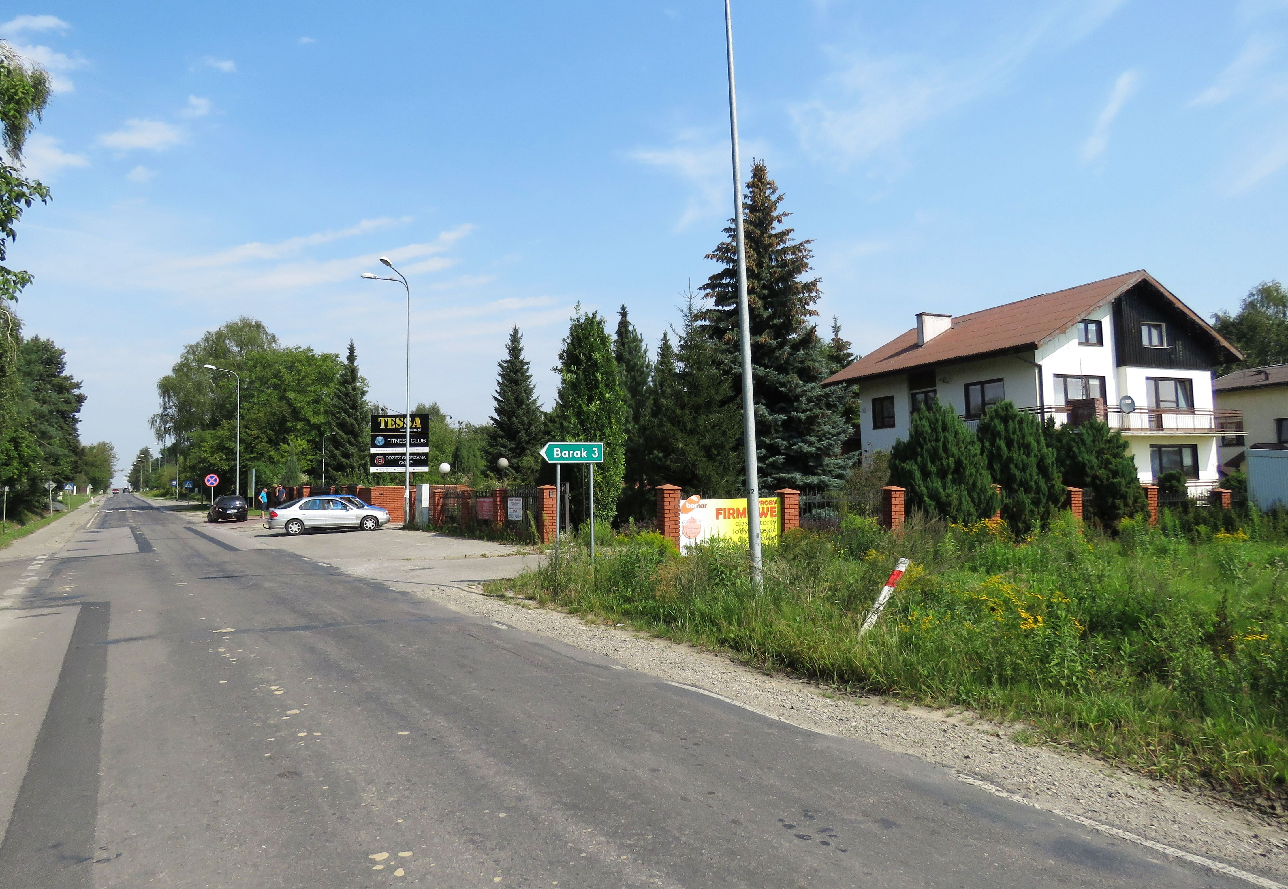 Marysin